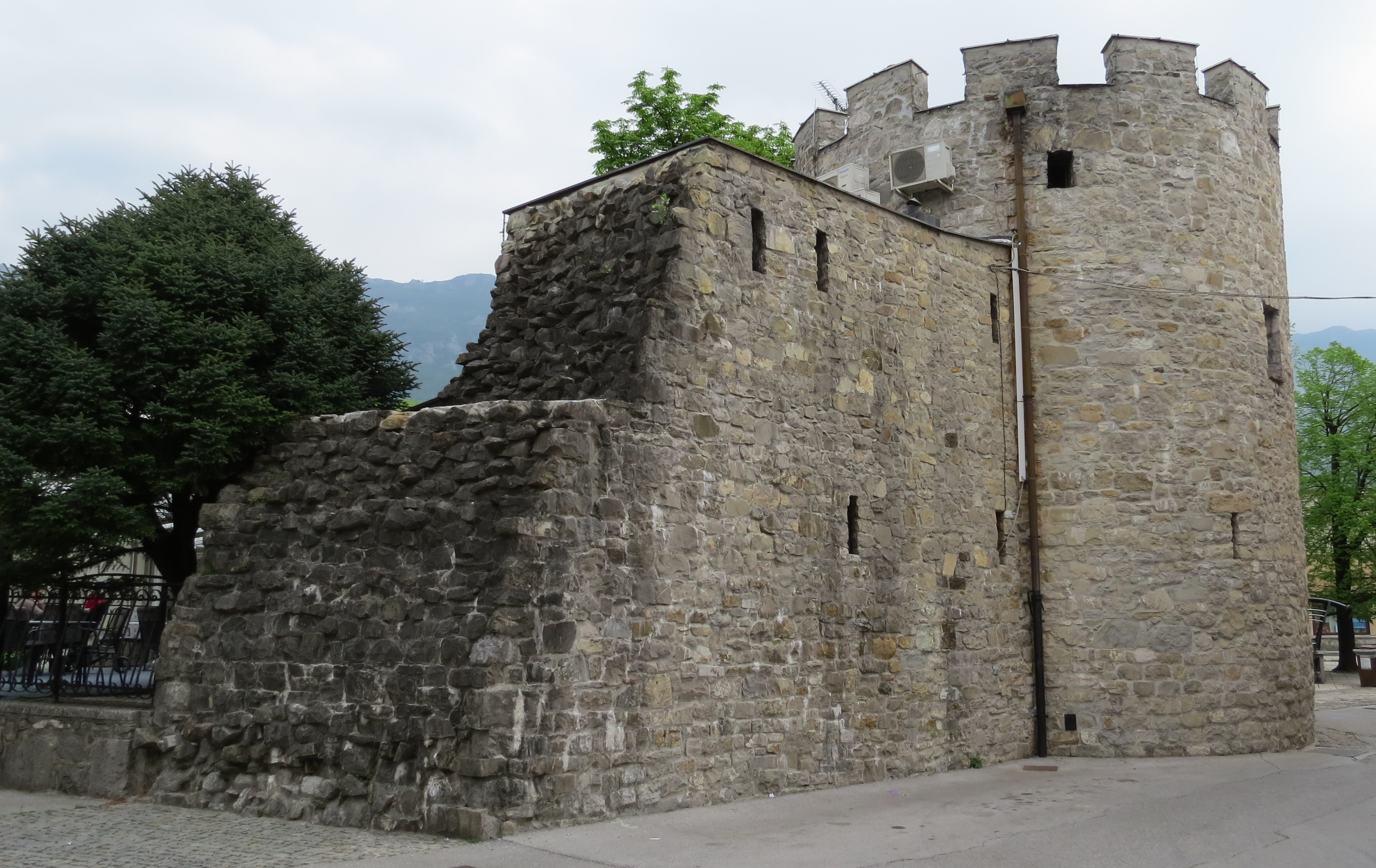 Ostanki Castra Ad Fluvium Frigidum, Ajdovščina, Slovenija.